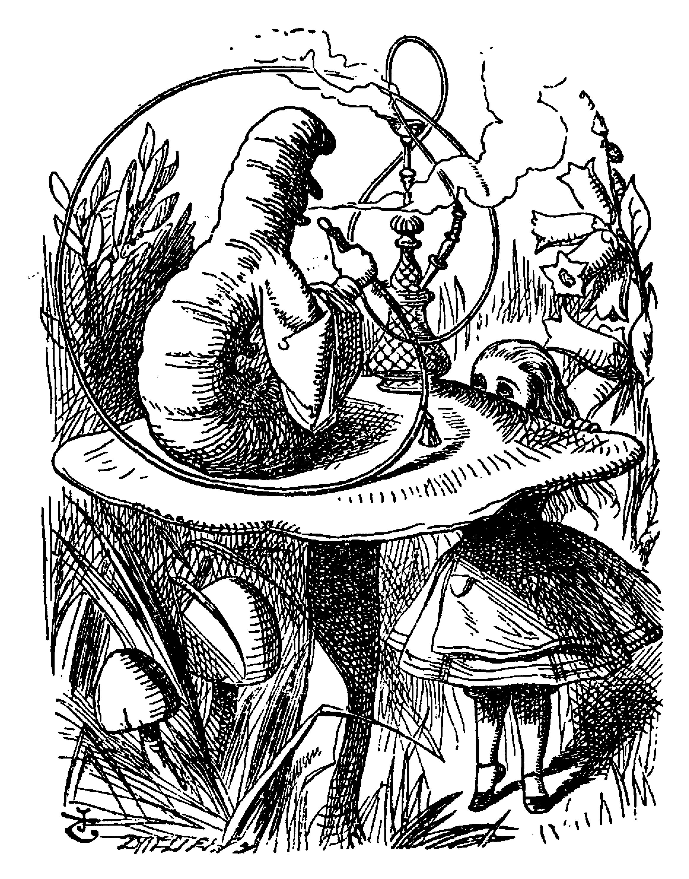 Alice’s Abenteuer im Wunderland Übersetzer: Antonie Zimmermann Orginal Titel: Alice's Adventures in Wonderland Illustrationen: John Tenniel